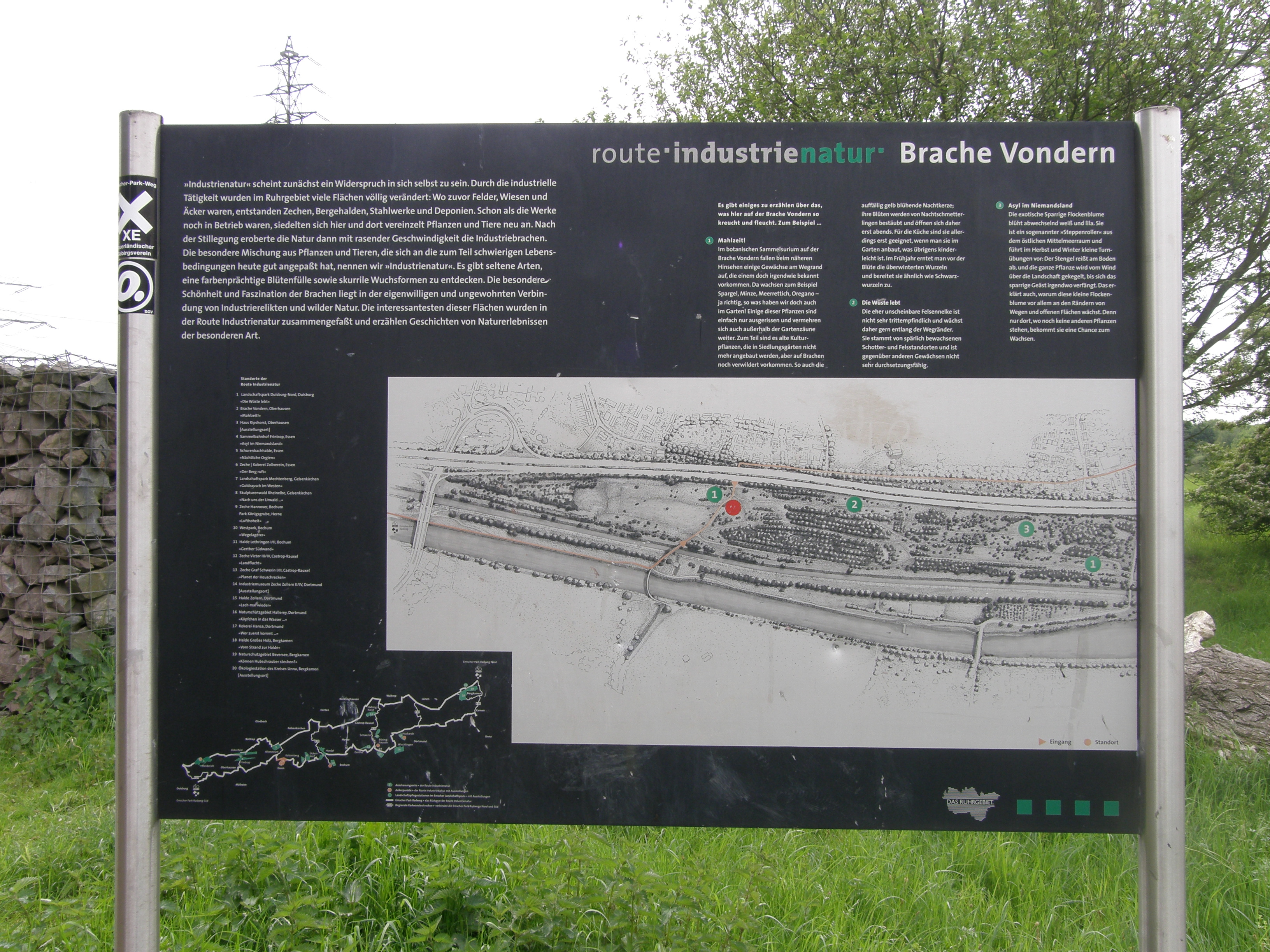 Infoschild der Route der Industriekultur - Themenroute 24: Industrienatur - an der Brache Vondern. Auf dem linken Pfeiler wurden zwei Wanderwegweiser angebracht. (Oberhausen, Nordrhein-Westfalen, Deutschland)